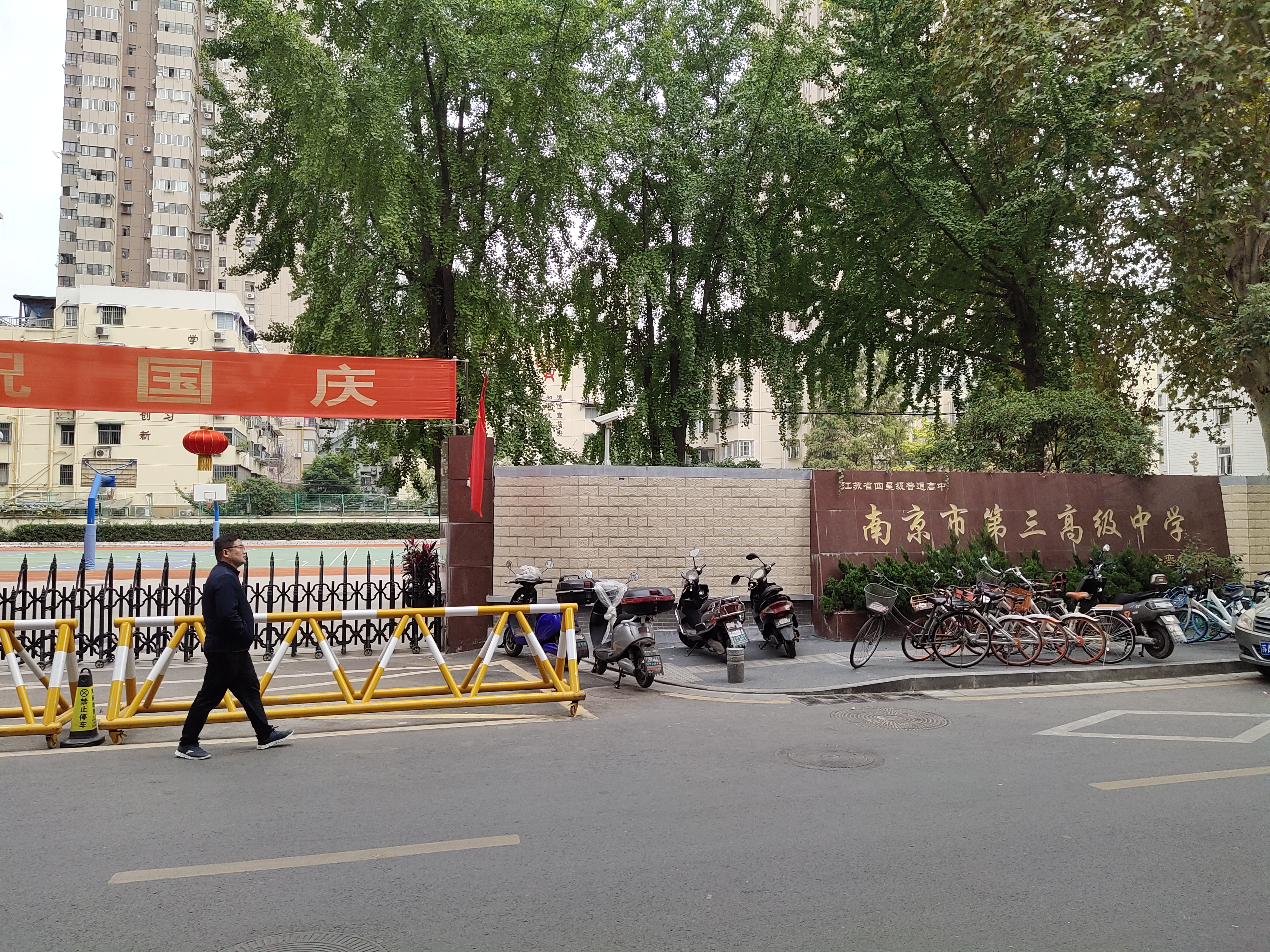 中文（中国大陆）: 南京市第三高级中学金銮校区